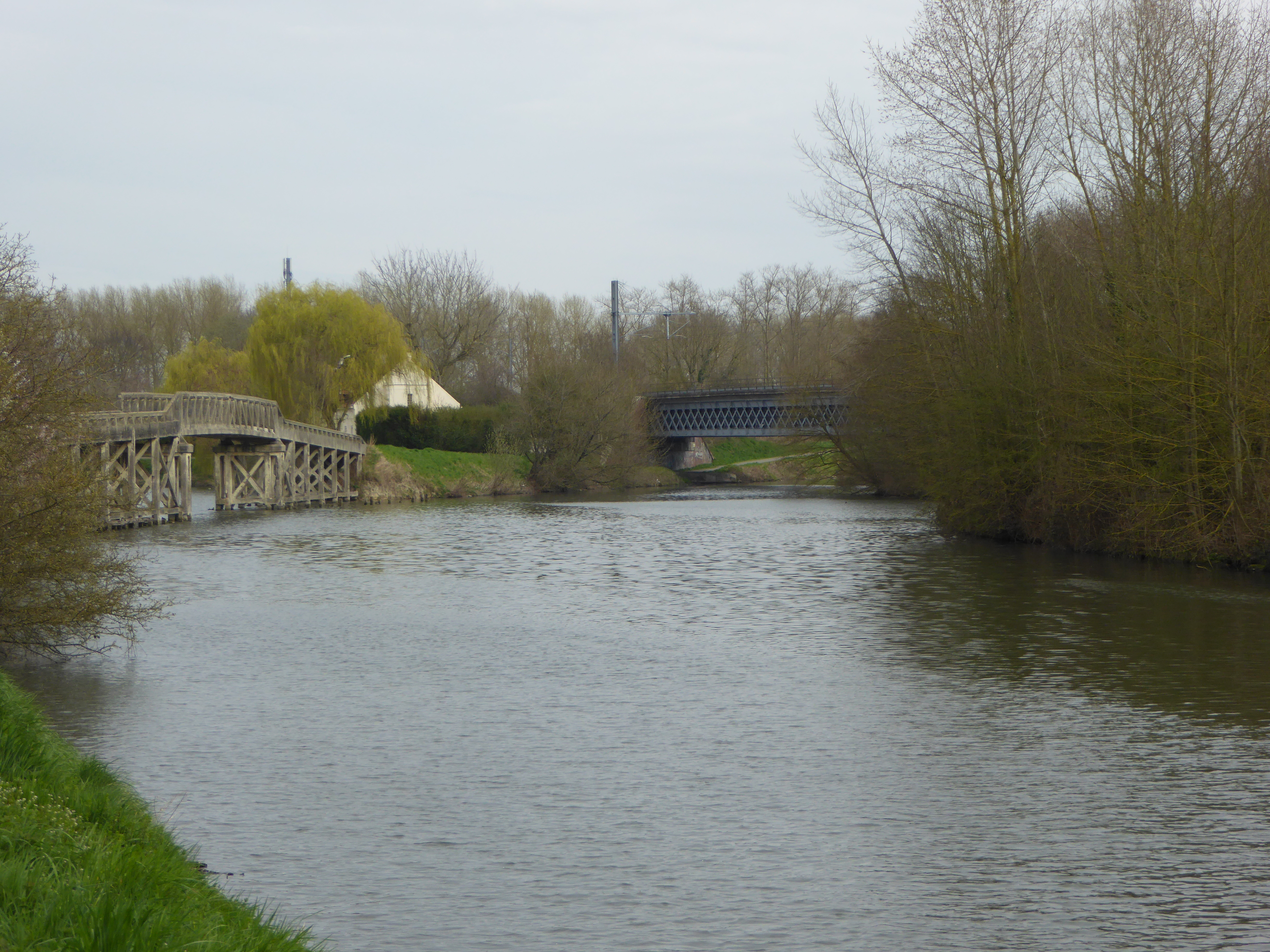 Le canal d'Aire La_Bassée, France